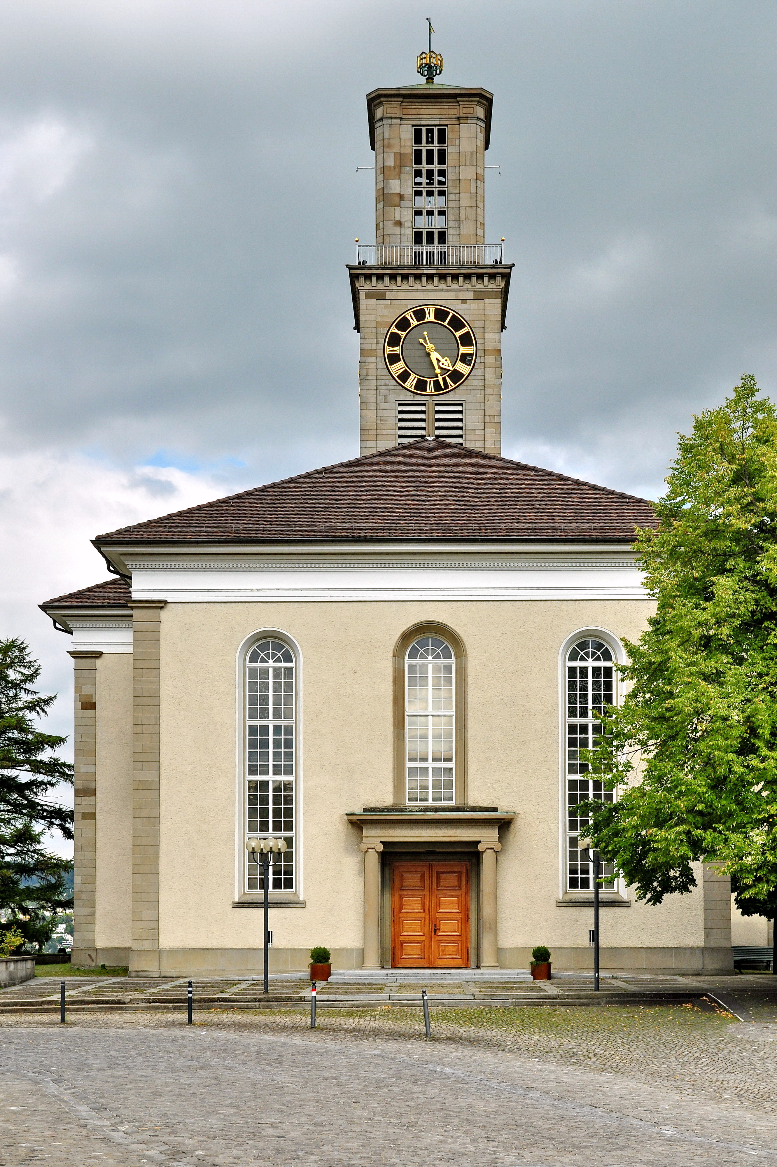 Reformierte Kirche in Thalwil (Switzerland)